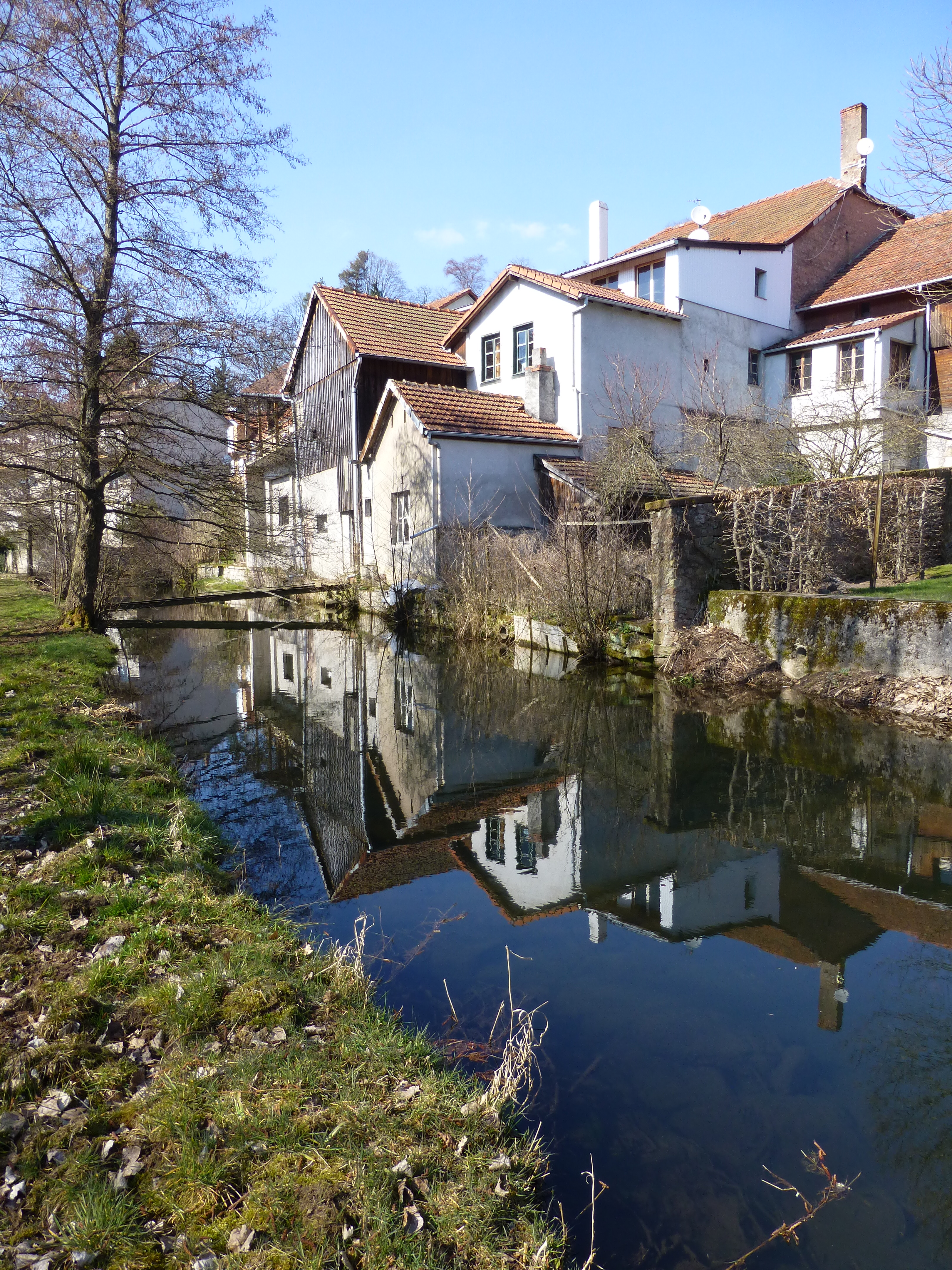 La Sarre rouge à Abreschviller (Moselle)